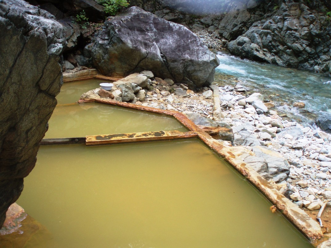 新潟県湯沢町赤湯温泉玉子の湯